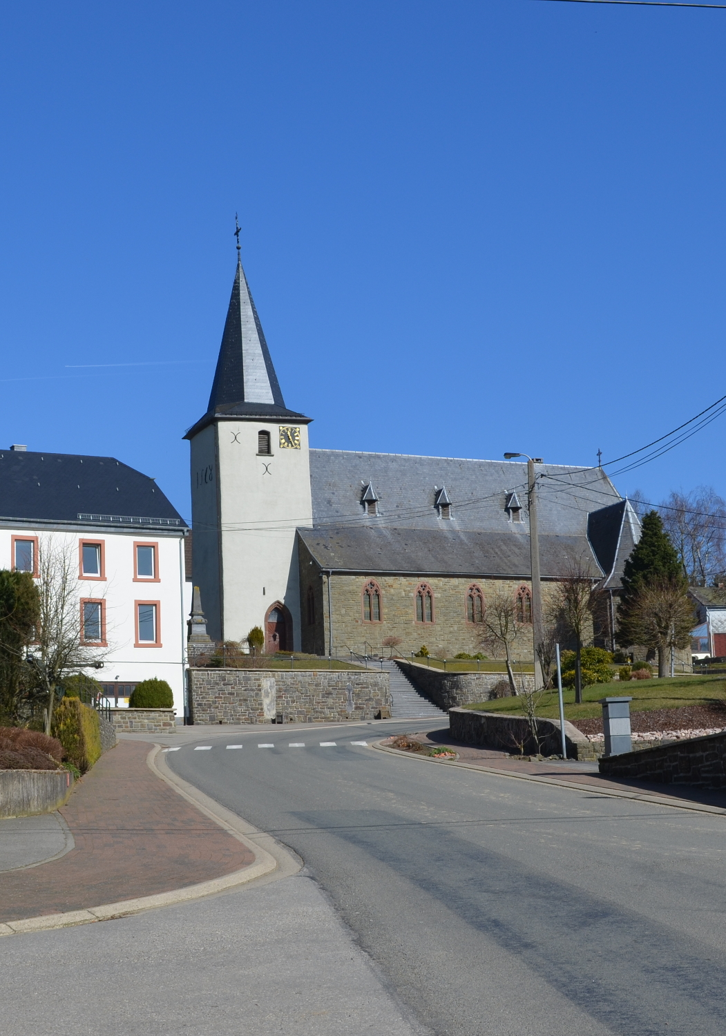 Pfarrkirche Meyerode